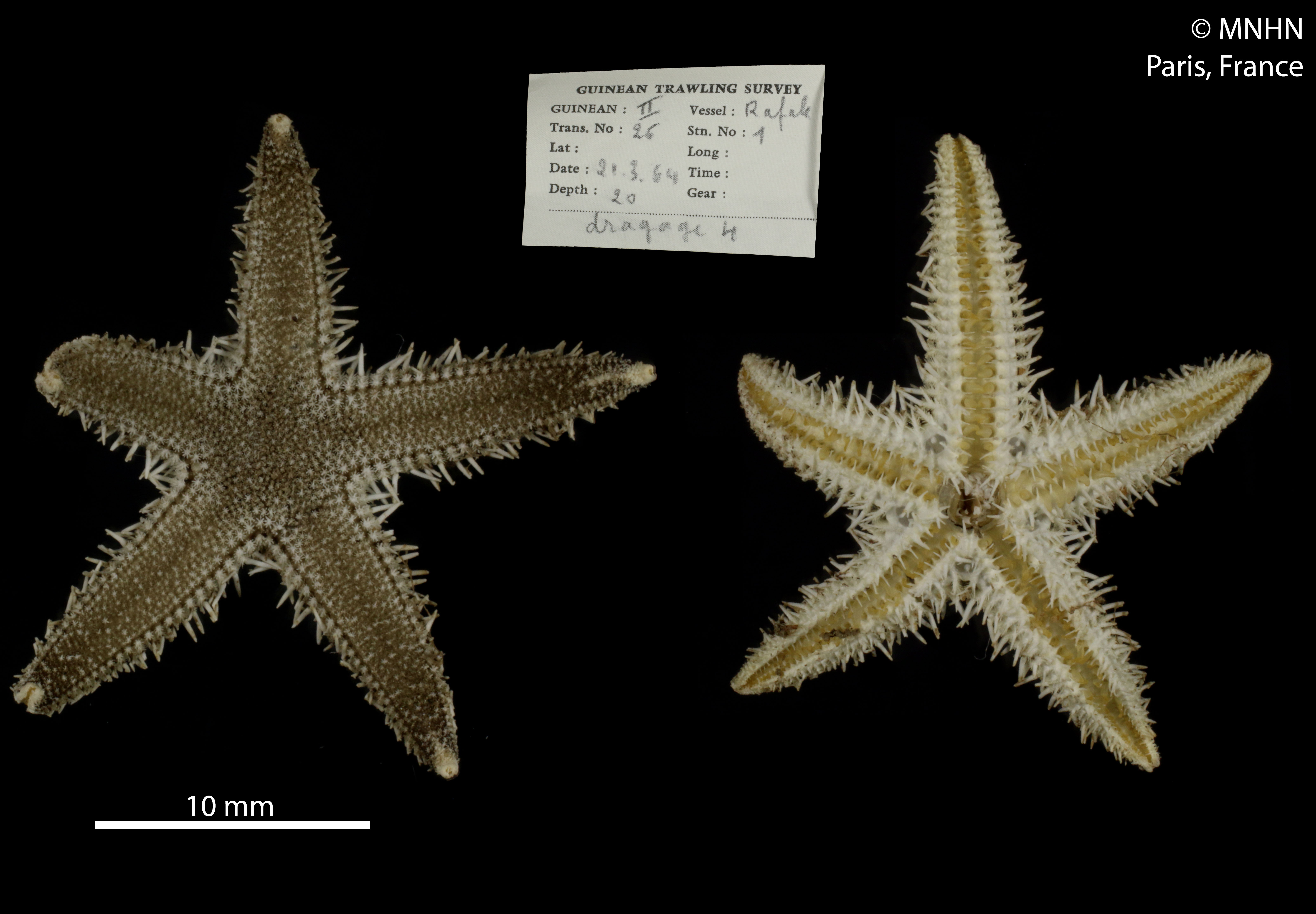 Luidia atlantideaSpécimen MNHN-IE-2014-622Collection : Échinodermes (IE)Muséum National d'Histoire Naturelle (Paris, France) Origine : Expédition : Guinean Trawling Survey II Navire : La Rafale Type : R.V Numéro de station : dragage 4 Date de récolte : 1964-03-21 Profondeur (mètres) : 20